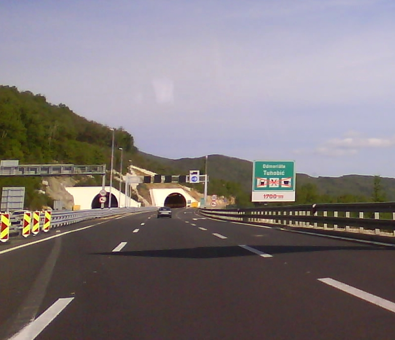 Odmorište Tuhobić